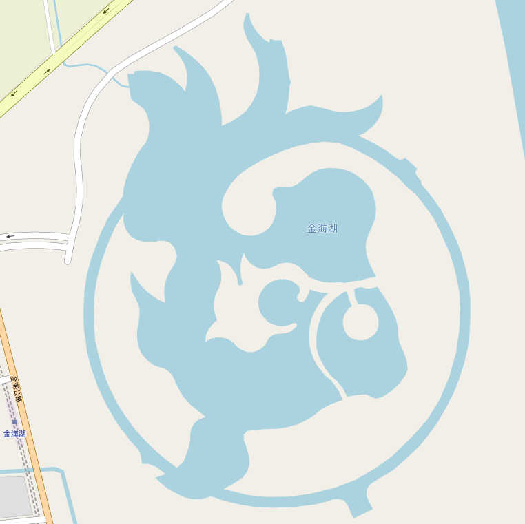 金海湖“上海之鱼” This map may be incomplete, and may contain errors. Don't rely solely on it for navigation.